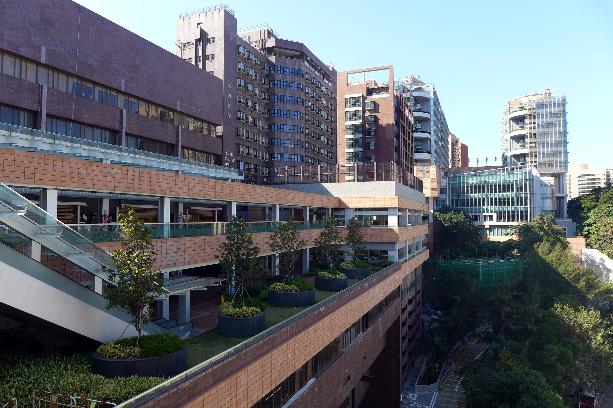 HKU Centennial Campus